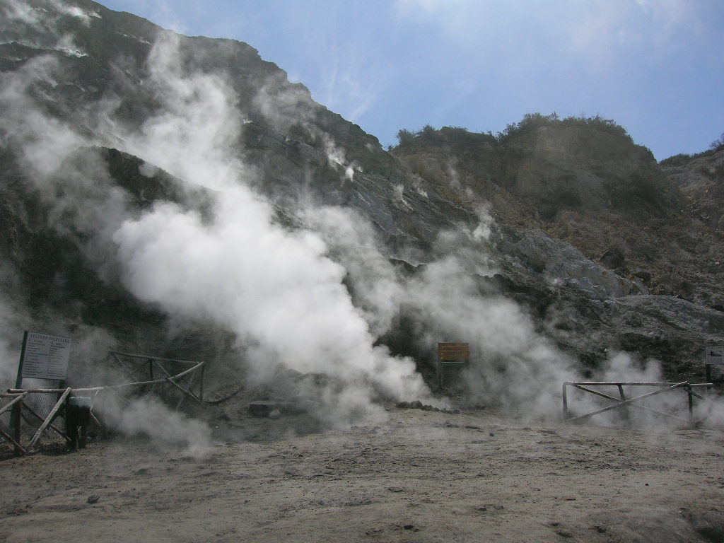 Veduta intera della Grande Fumarola